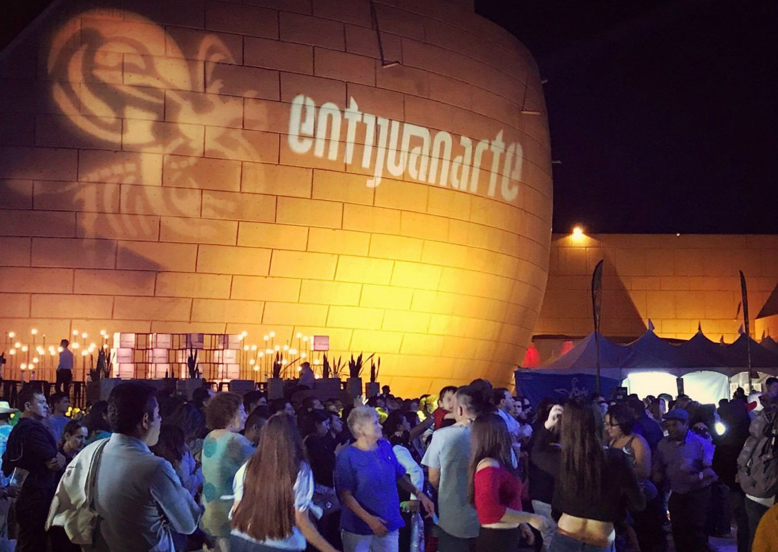 El festival artístico y cultural con mayor trascendencia en el norte del país. Entijuanarte es un festival cultural que se fundó en 2005, se celebra la primera semana de Octubre, esta fundación surge como proyecto de vocación cultural desde la sociedad civil. Surge como una necesidad social y cultural. Ante la problemática social que se vivía en la ciudad de Tijuana el objetivo de entijuanarte era que sus acciones generarán una visión diferente. Este festival Cultural ha logrado el desarrollo y la coexistencia de múltiples propuestas artísticas para una misma sociedad mediante un amplio programa de actividades y de fomento a la comprensión, investigación y desarrollo artístico a través de diversos espacios de intercambio y diálogo, ha estimulado el acercamiento y la reflexión sobre las manifestaciones socio-culturales actuales; ha creado una forma de vivir en la frontera. La intervención urbana y demás manifestaciones artísticas que caracterizan a esta zona norte de México son el performance, el arte urbano, la fotografía, la danza, la literatura, el teatro, la poesía, la música, el cine. Este proceso nos ha unido como región, que a su vez es un espejo creativo de nuestro país. Entijuanarte integra un programa que brinda capacitaciones, asesorías, talleres encaminados hacia el desarrollo del emprendedurismo Cultural, con lo cual se busca impulsar a pequeñas y medianas empresas de diseño creativo. .